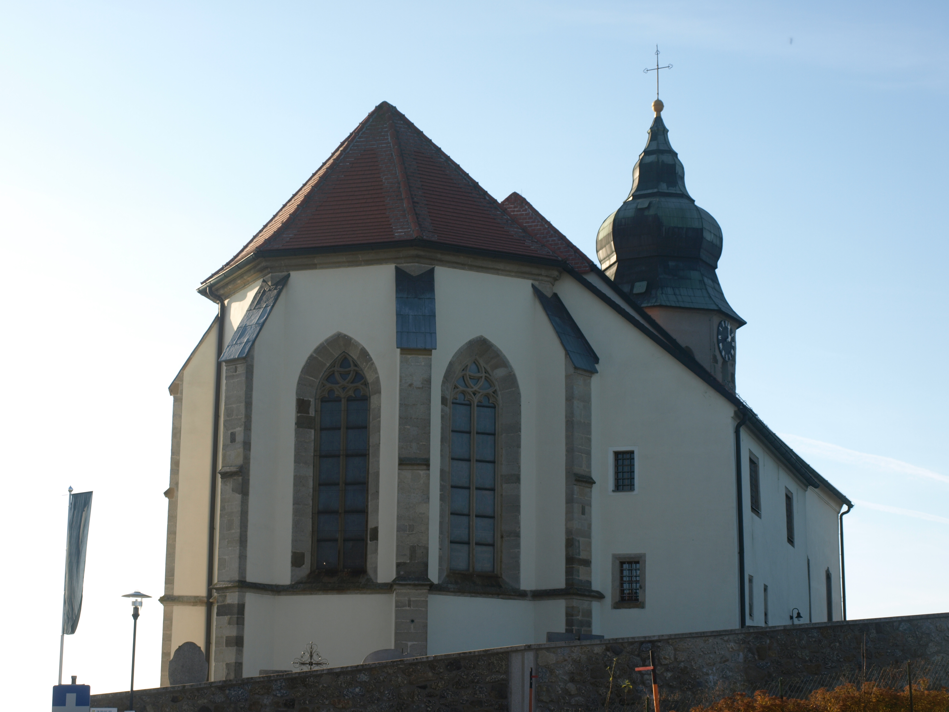 Kath. Pfarrkirche, Wallfahrtskirche hl. Ottilie